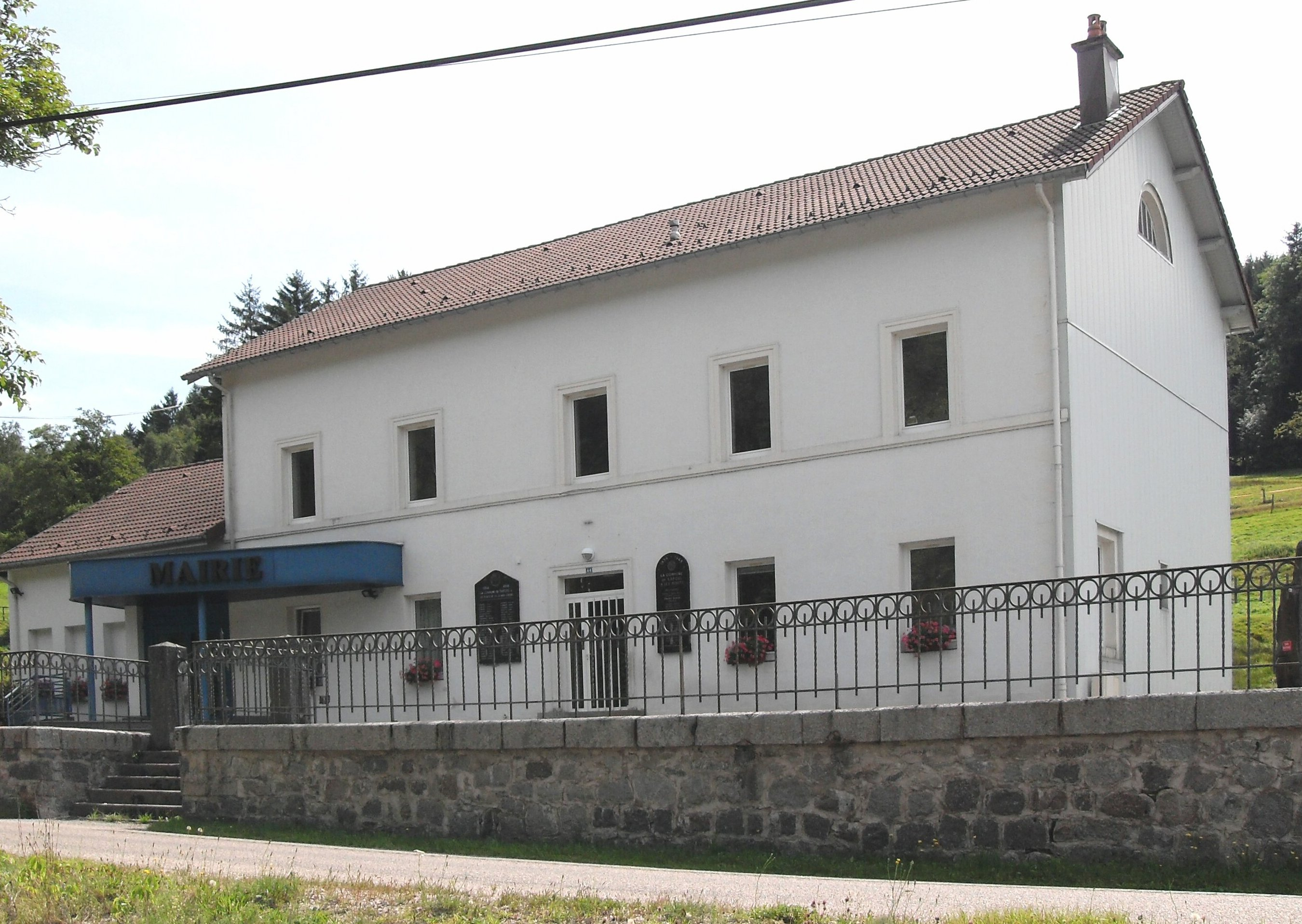 Lamairie de Sapois